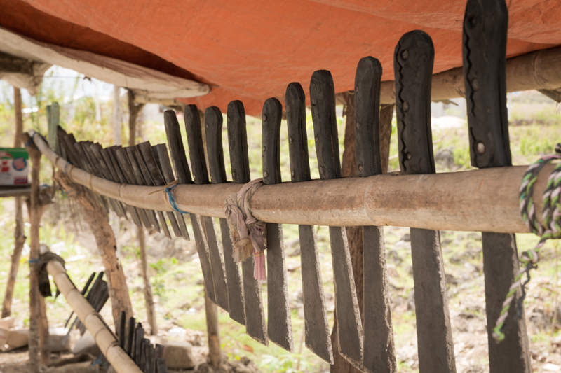 Werkzeugschmiede in Manatuto, Osttimor